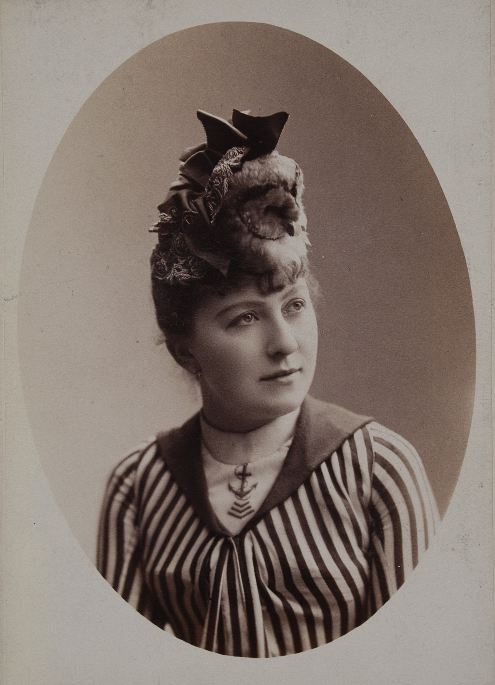 Jadwiga Czaki